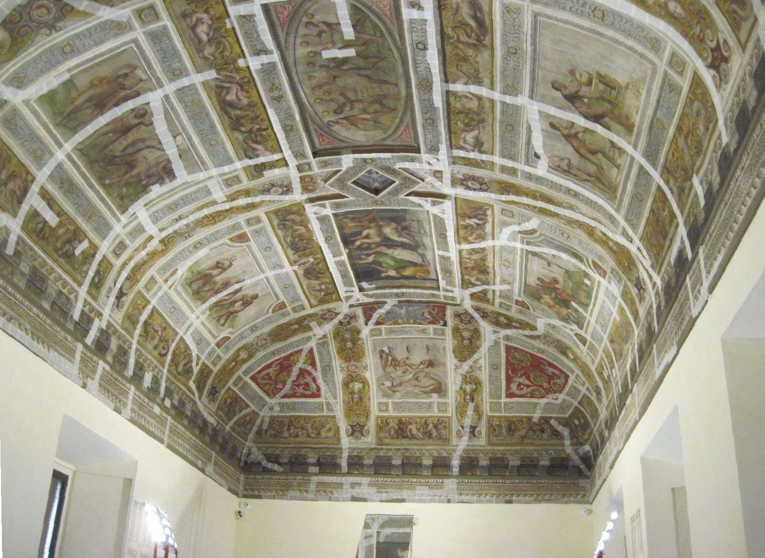 Castello Estense, Ferrara, restauri, sisma